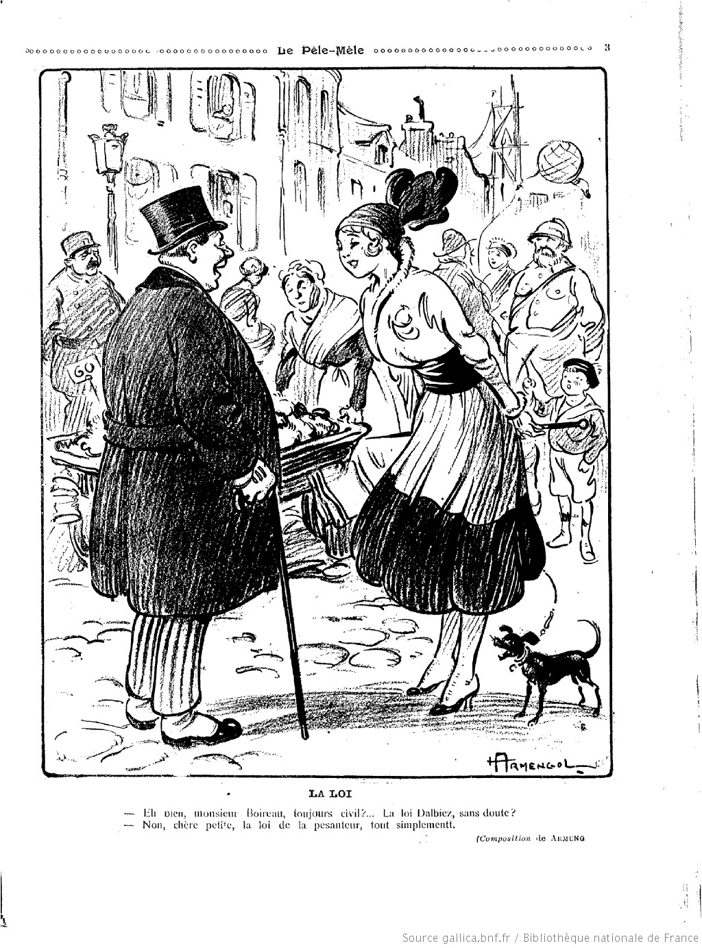 Pêle Mêle 18 6 16 Loi de la pesanteur